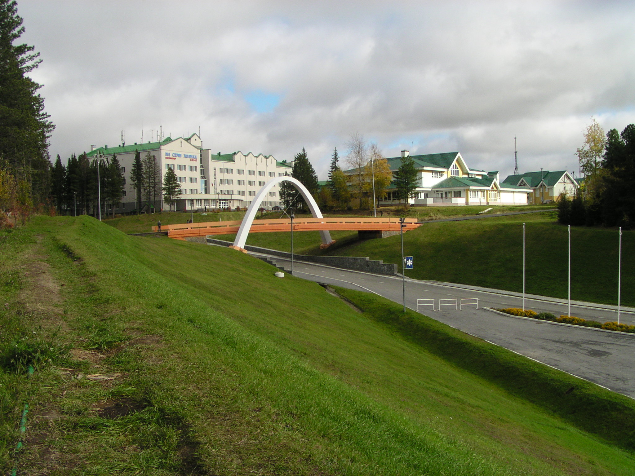 Биатлонный центр в Ханты-Мансийске